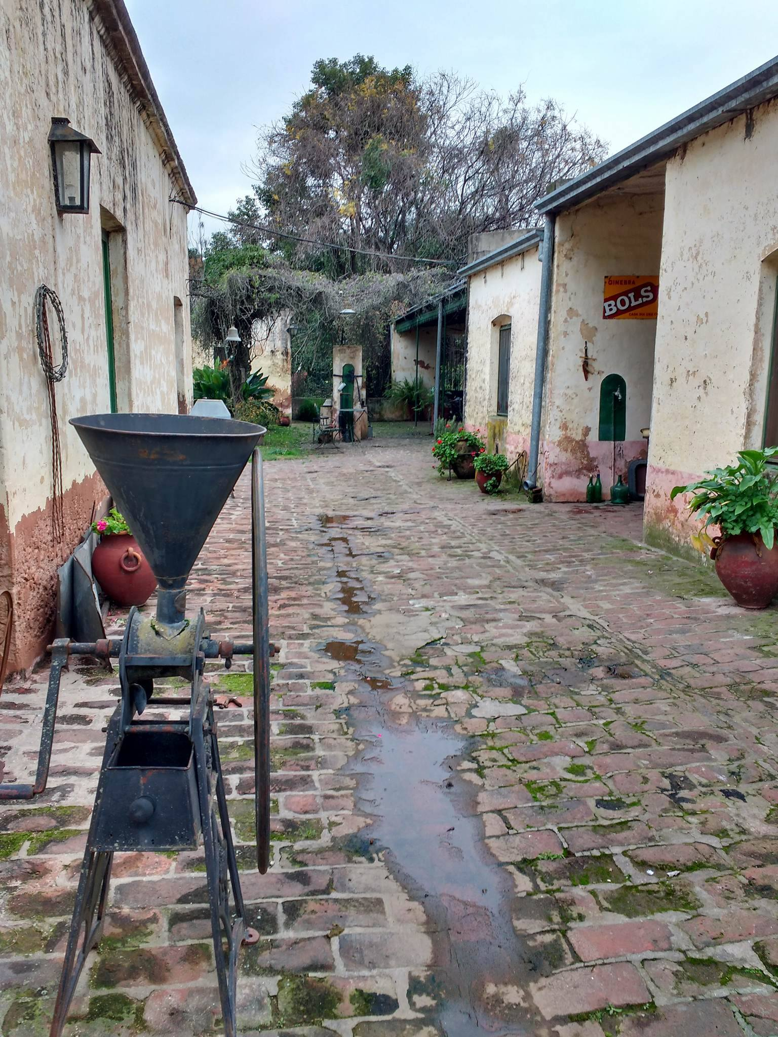 En el patio del lugar se puede observar maquinas de la época.